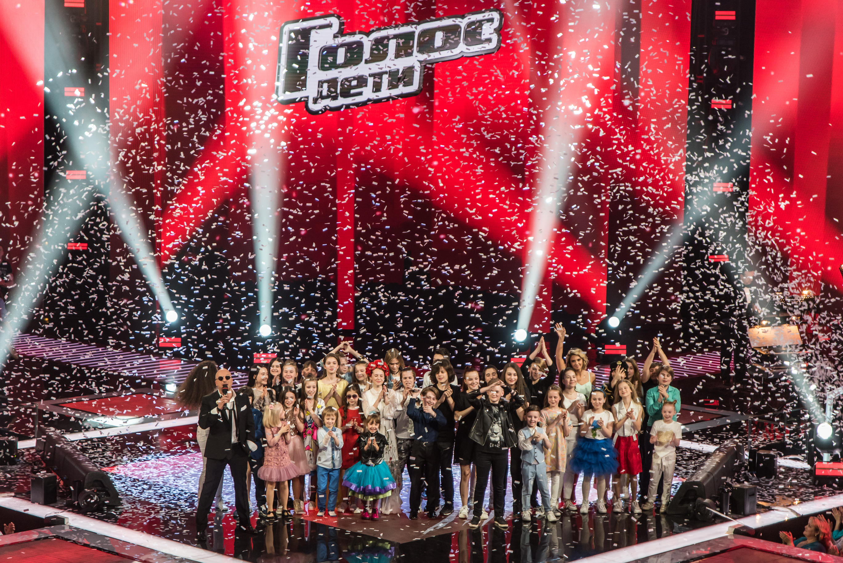 Финал Голос. Дети 5. Участники на сцене